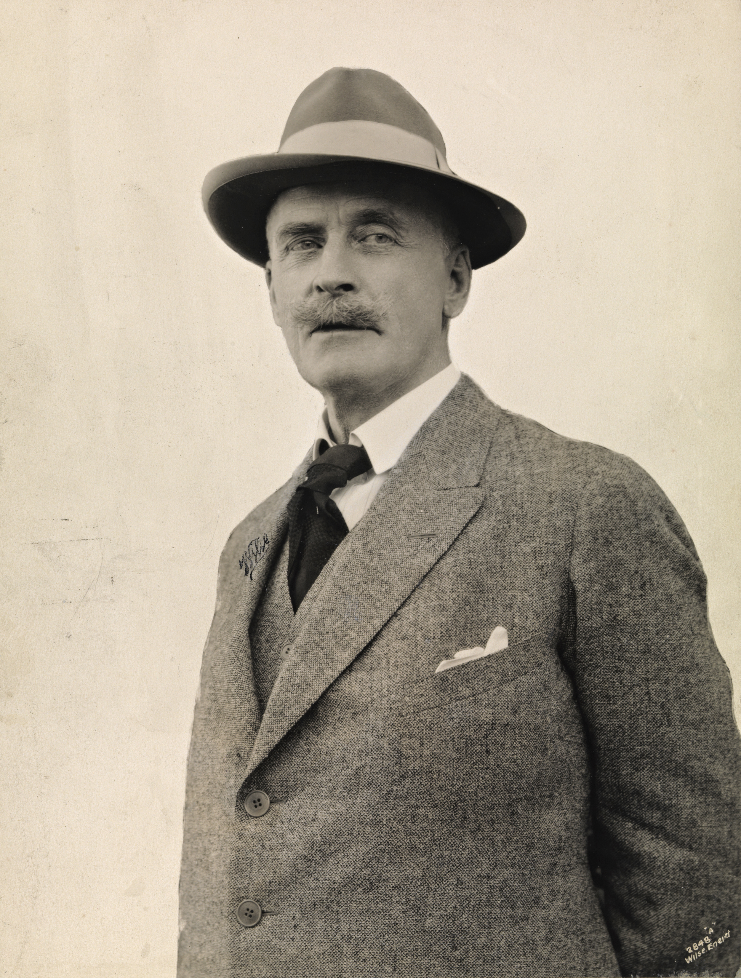 Knut Hamsun, juni 1927.